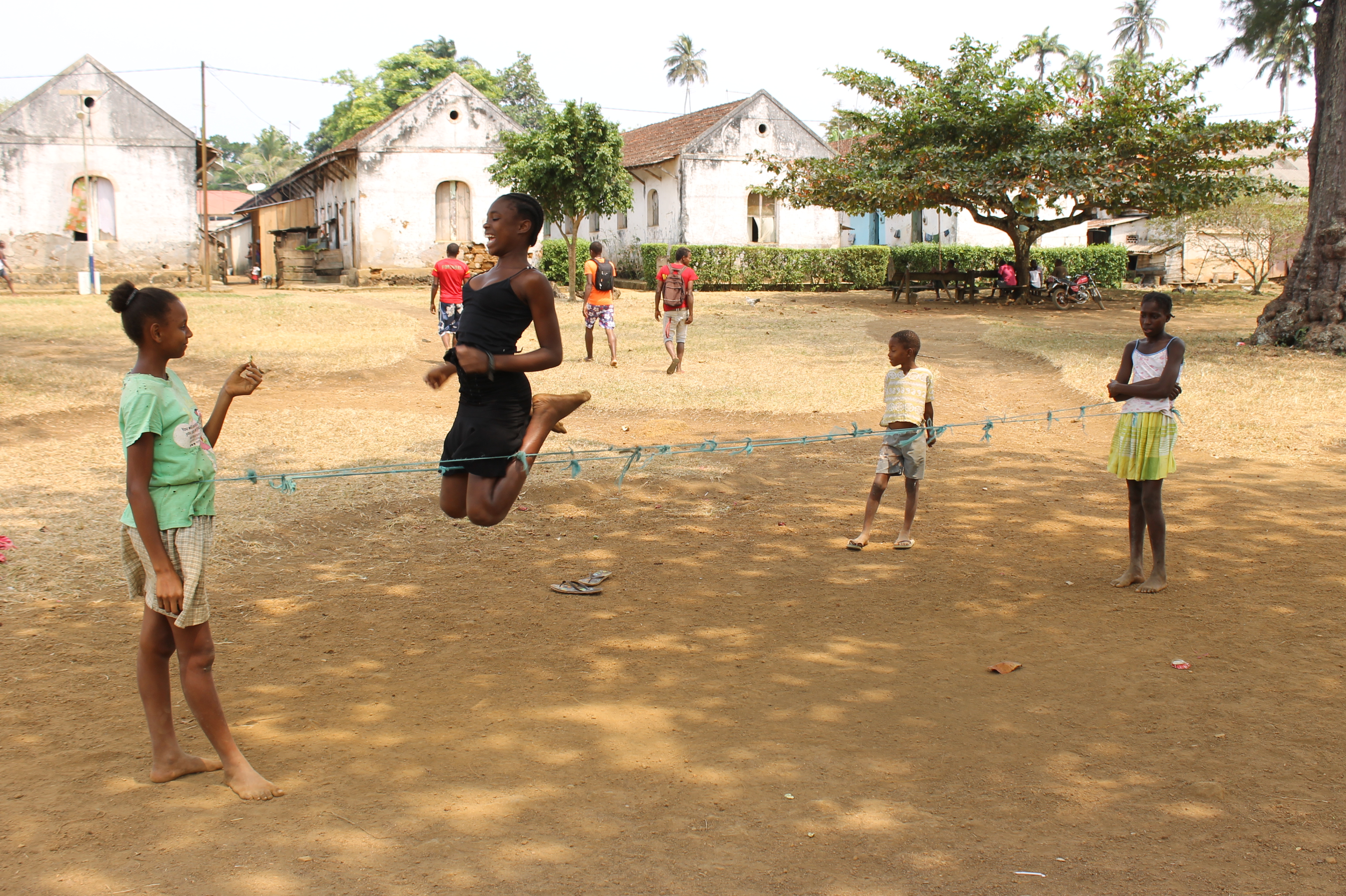 Roça Sundy This is an image of the Biosphere Reserve or a Geopark: Island of Príncipe Biosphere Reserve